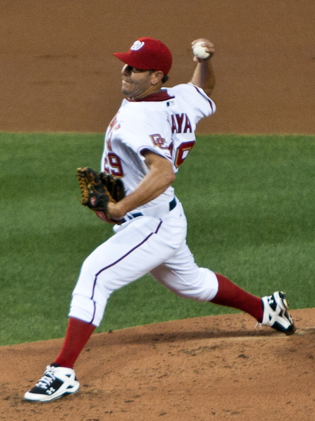 Yunesky Maya